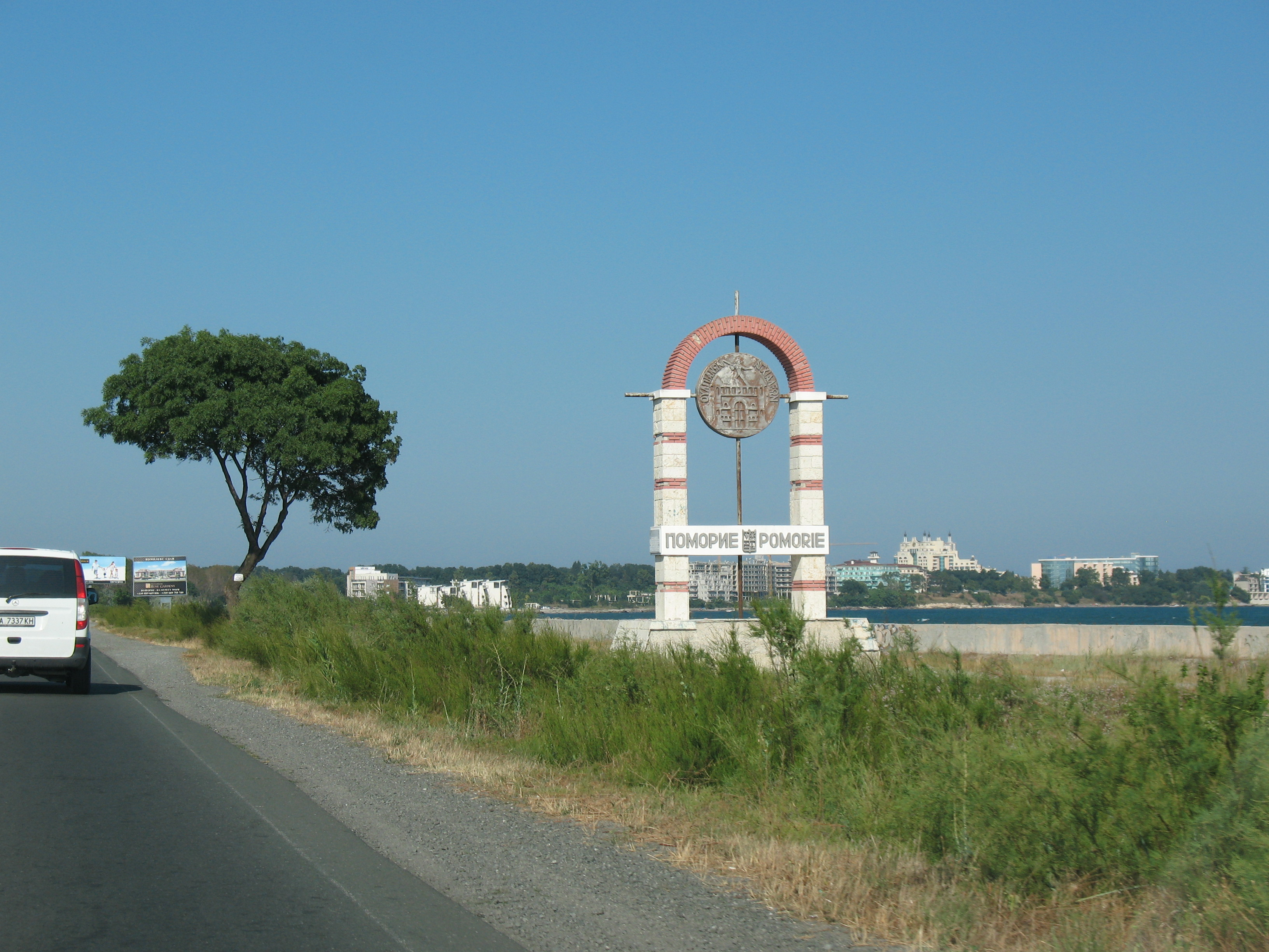 Поморие